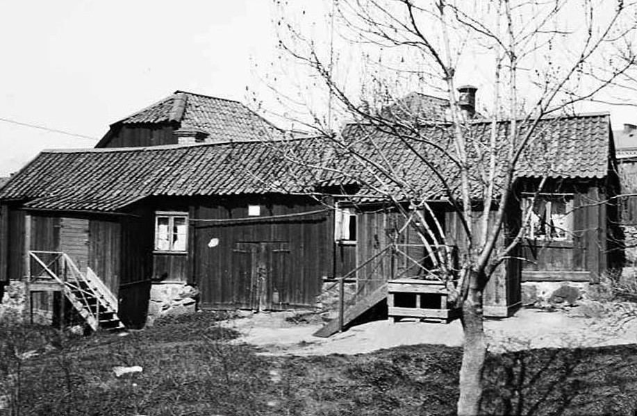 Trähus, Renstierns gata 39, sedermera Svenska Ords skrivstuga. Den vänstra delen är riven.